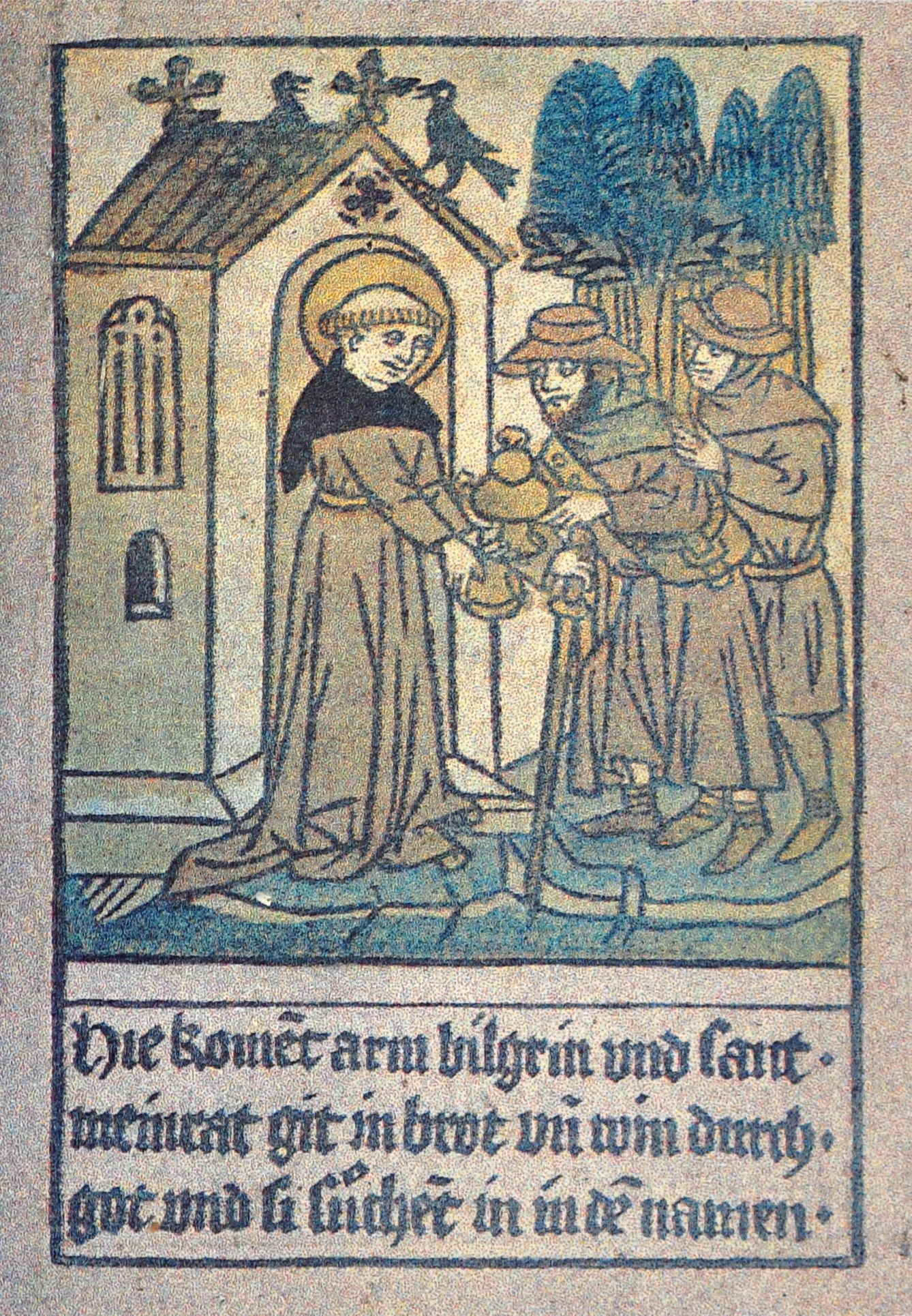 Sankt Meinrad